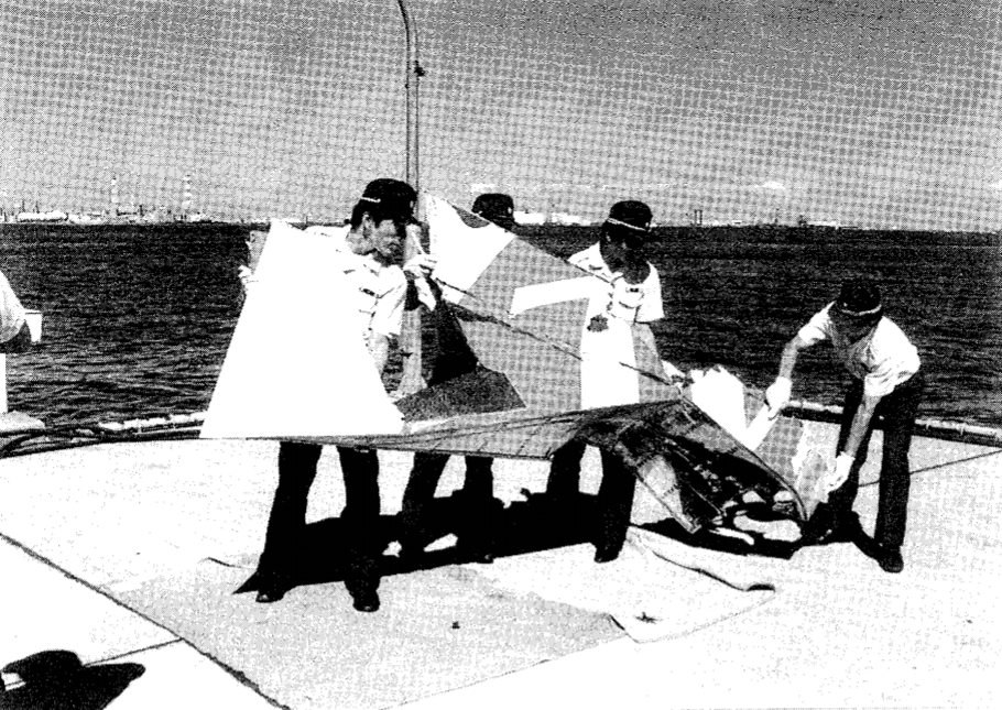 日本航空123便の尾翼部 JTSB公表の報告書より（62-2-JA8119 日本航空(株)所属 ボーイング 747SR-100型 JA8119 群馬県多野郡上野村）